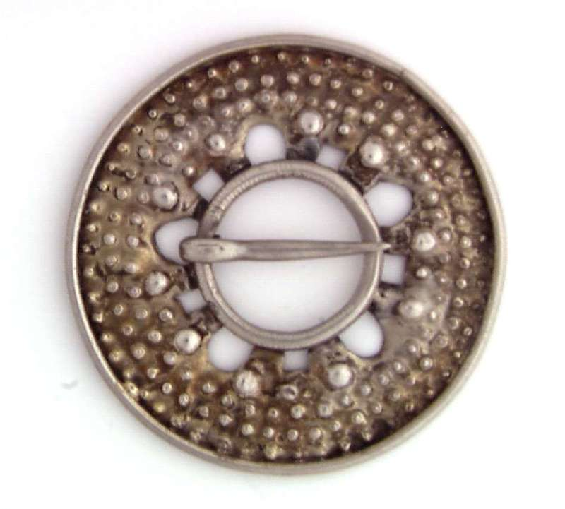 Tindesølje i forgylt sølv fra Bykle i Aust-Agder. Foto Anne-Lise Reinsfelt / Norsk Folkemuseum, NF.1897-0571.